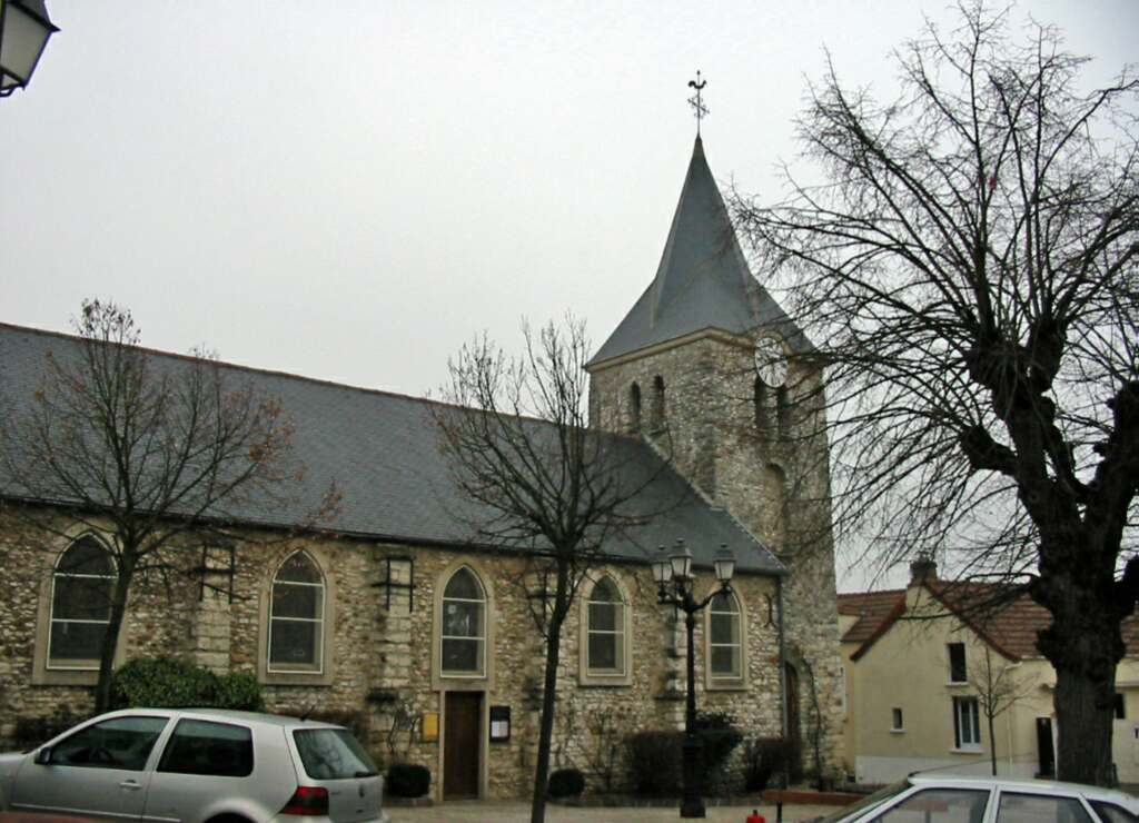 Église de Buchelay (Yvelines) Photo JH Mora février 2006